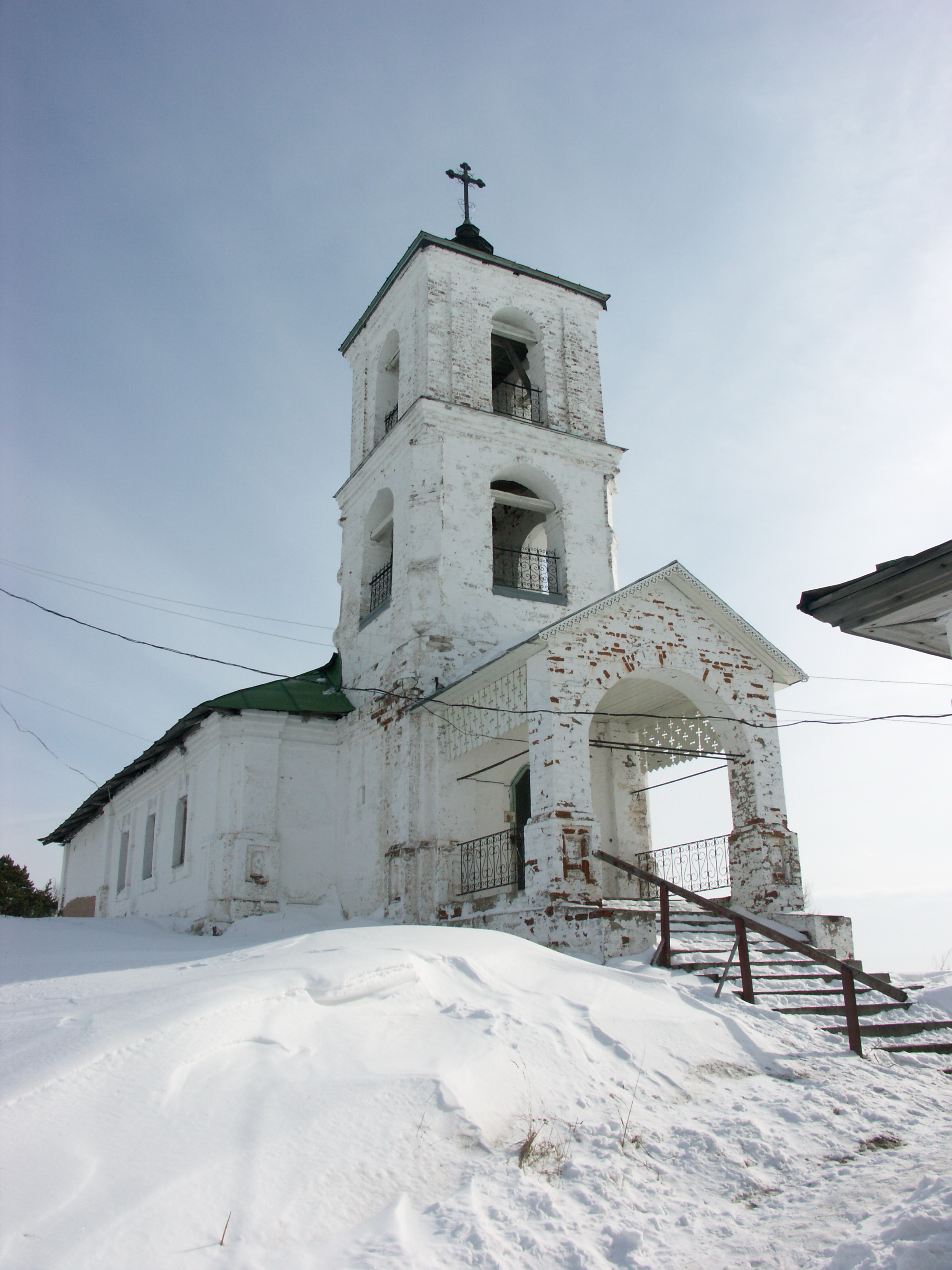 Церковь Введения во Храм Пресвятой Богородицы (Вологодская область, Кириллов, село Горицы)